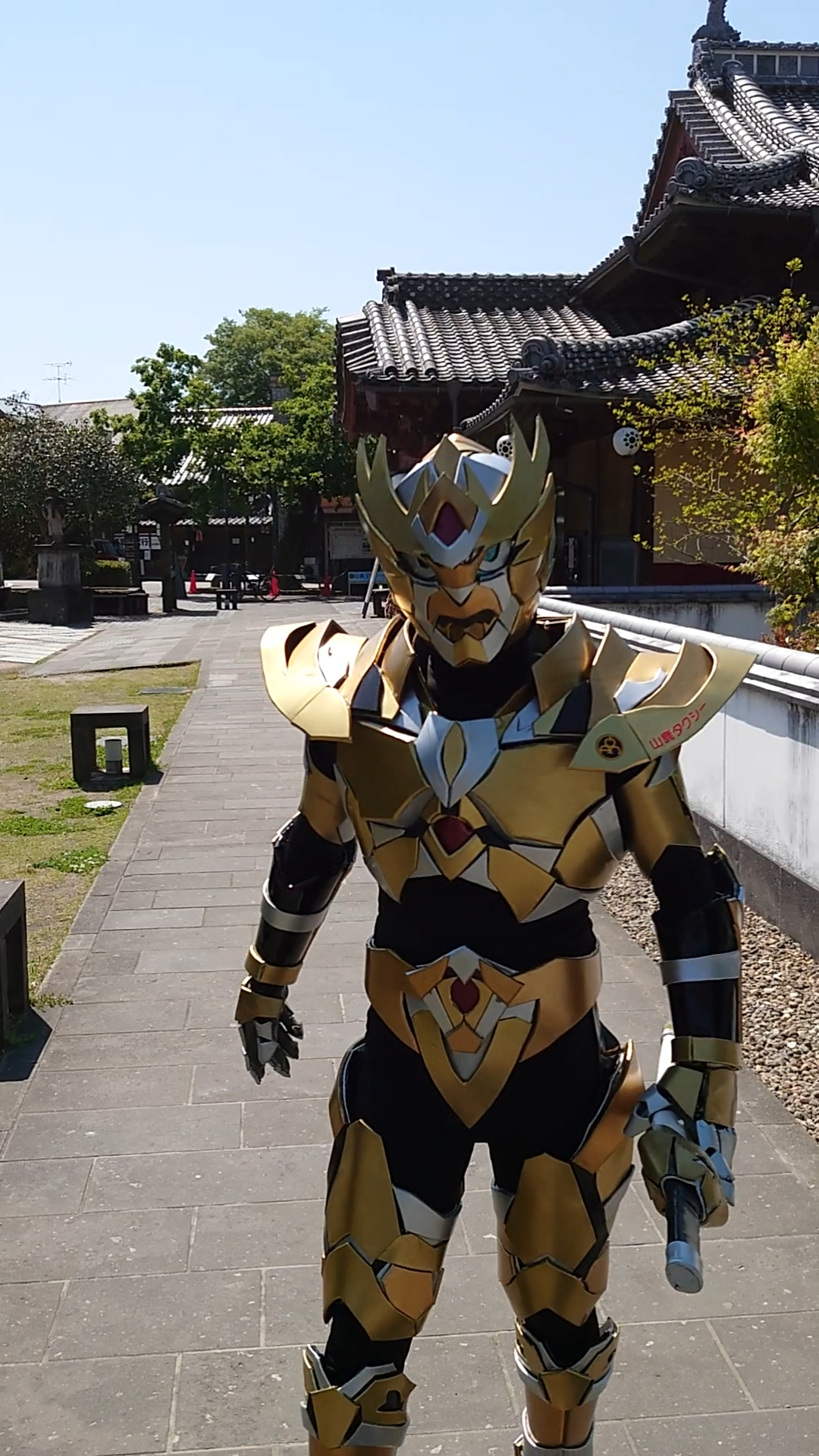 2017年7月にproject-gaouにより熊本県山鹿市にて企画されたオリジナルヒーロー。